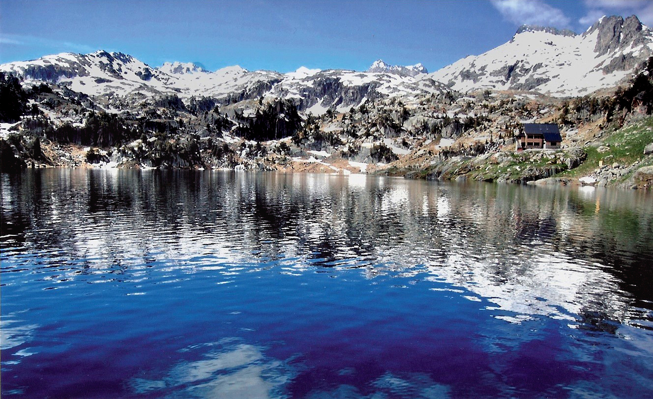 Colomers Naut Aran estany Major amb restes de neu de l´hivern This is a a photo of a wetland in Catalonia, Spain, with id: IZHC-99999999